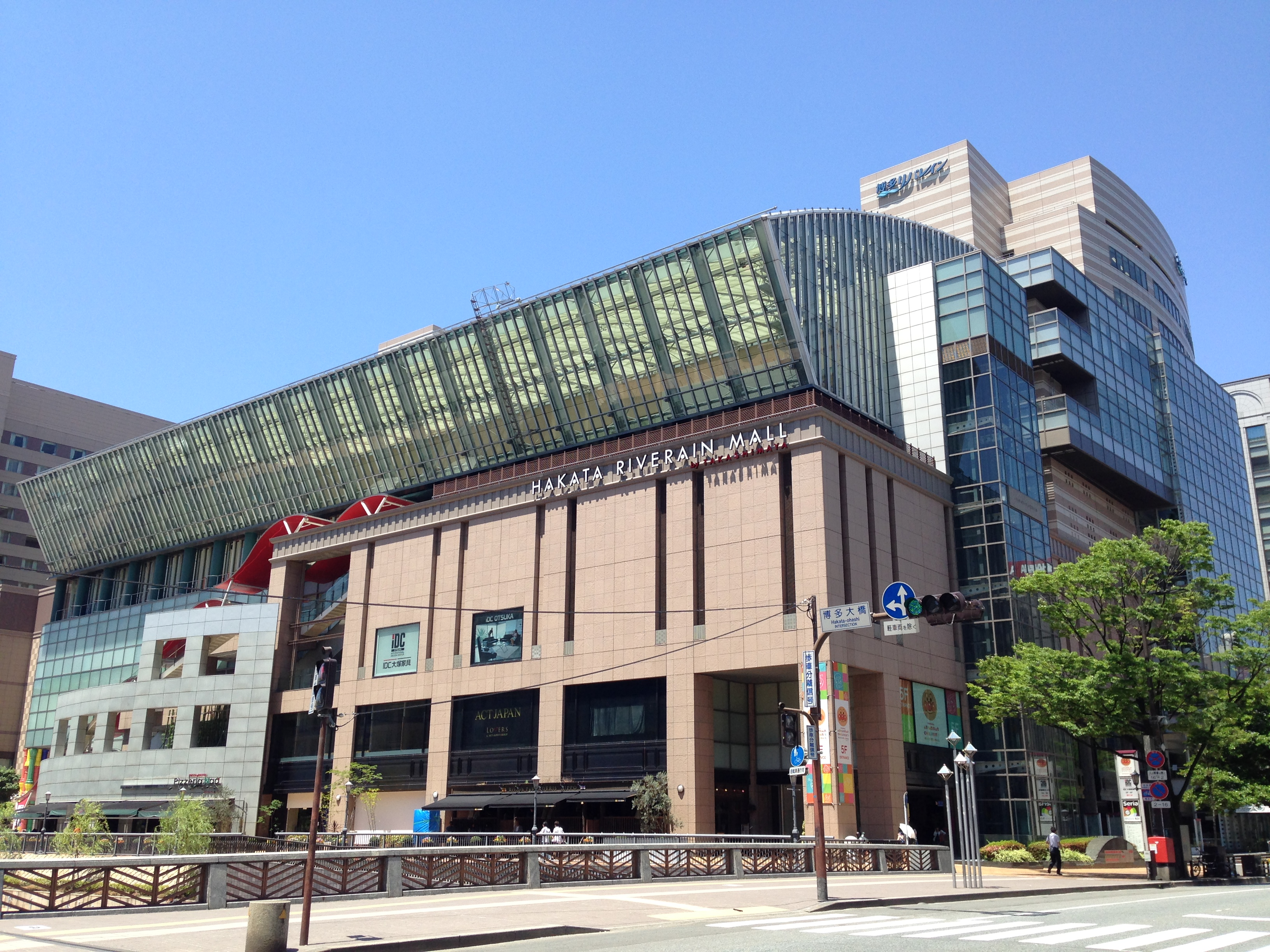 商業施設・博多リバレインモール、福岡市博多区